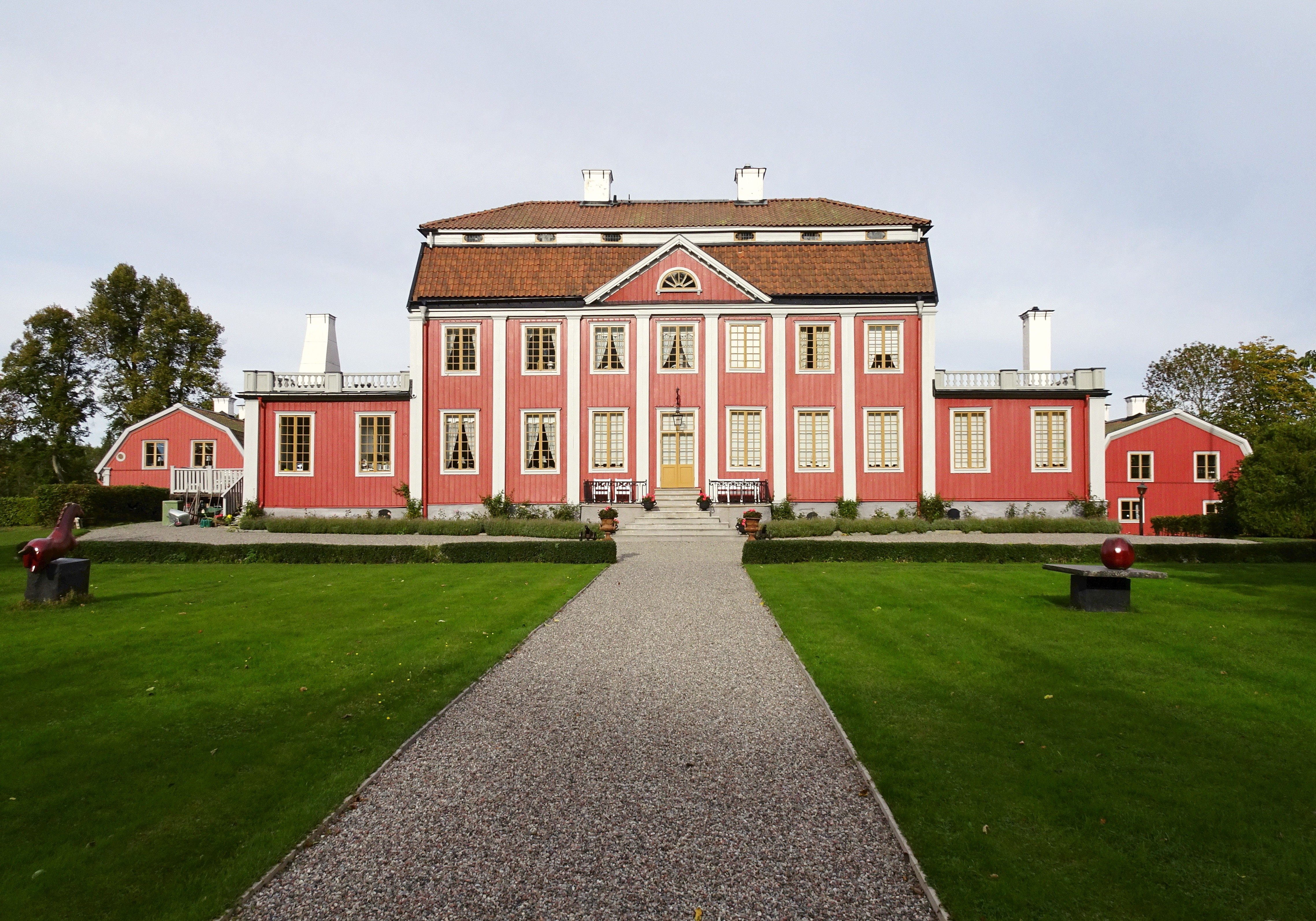 Horns säteri, huvudbyggnad